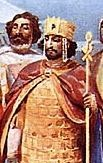 John I Tzimiskes